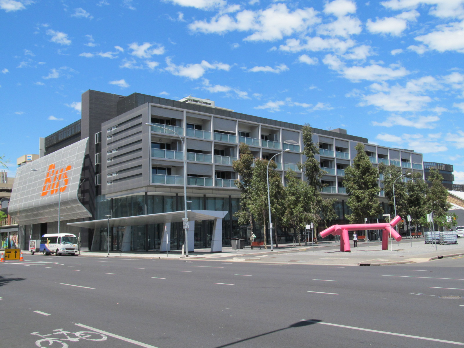 Adelaide Central Bus Station in Franklin Street, Adelaide.